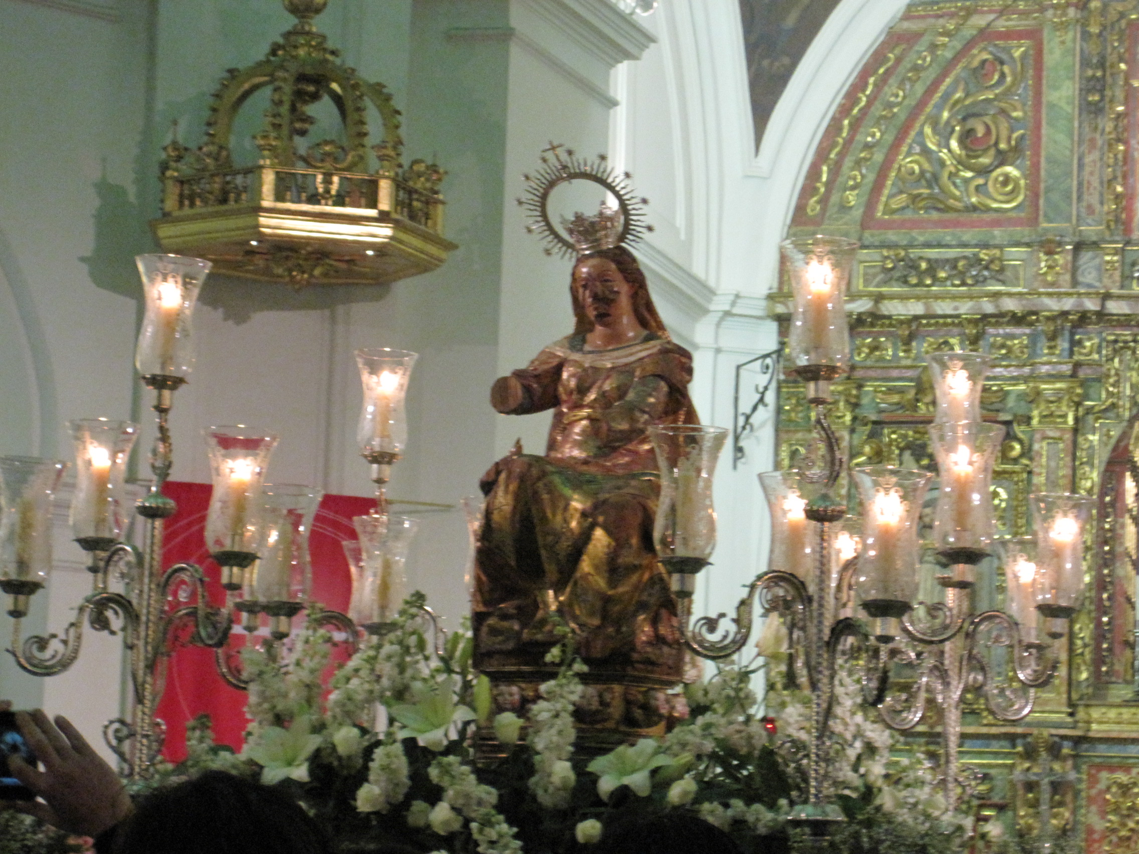 Imagen de Nuestra Señora de la Vulnerata. Real Colegio de San Albano, Valladolid (España).